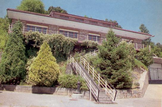 Panorámica del Centro Cultural, situado en la plaza anexa a la Iglesia de Santa Eulalia de Igollo (Cantabria, España)